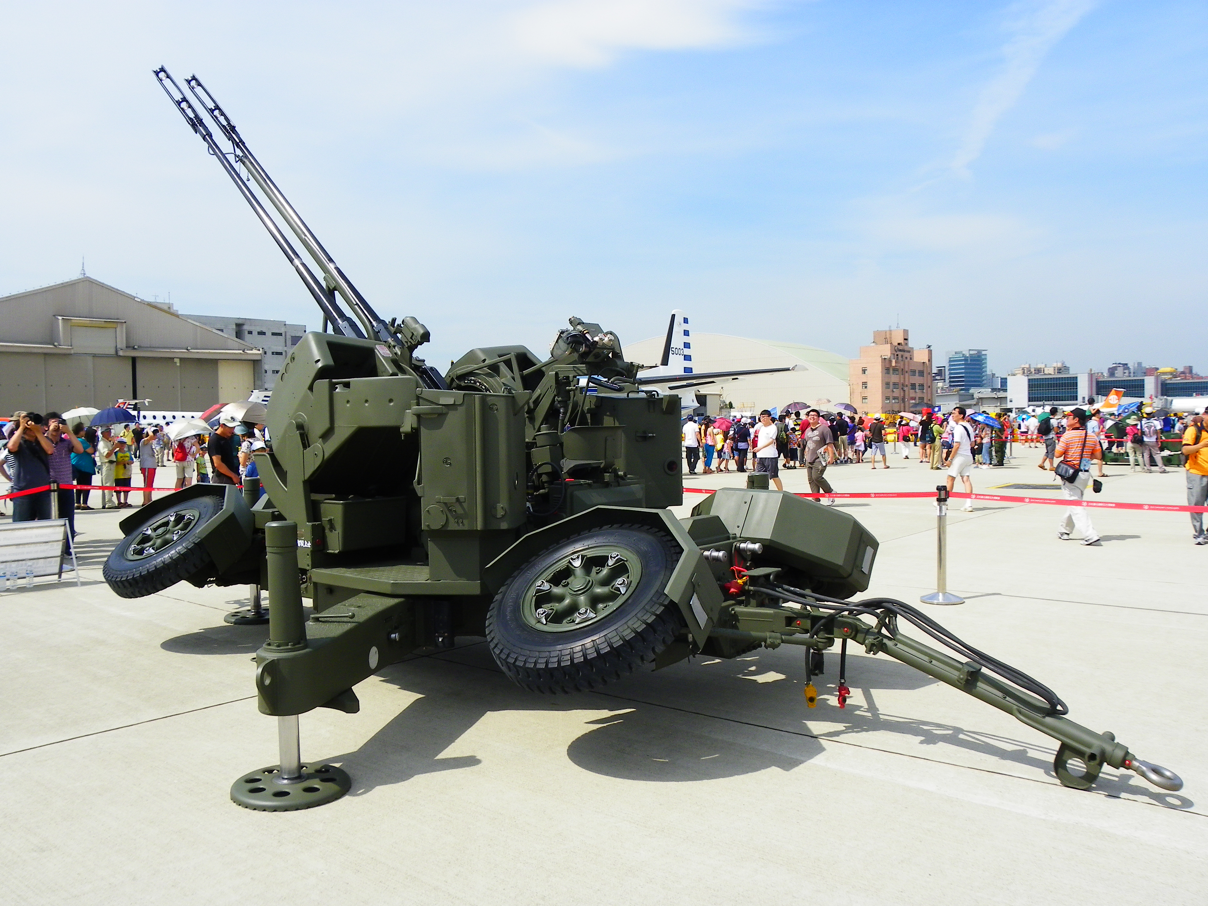 斜後方所見奧立崗GDF-003 35快砲，攝於2011年8月13日空軍松山基地營區開放活動。